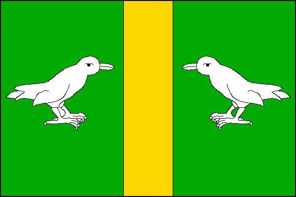 Vlajka obce Široká Niva